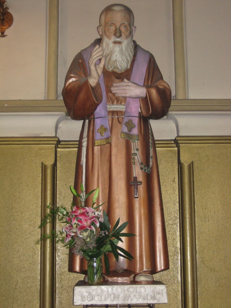 Kip Sv. Leopolda Bogdana Mandića u crkvi Gospe Lurdske u Rijeci. Croatia